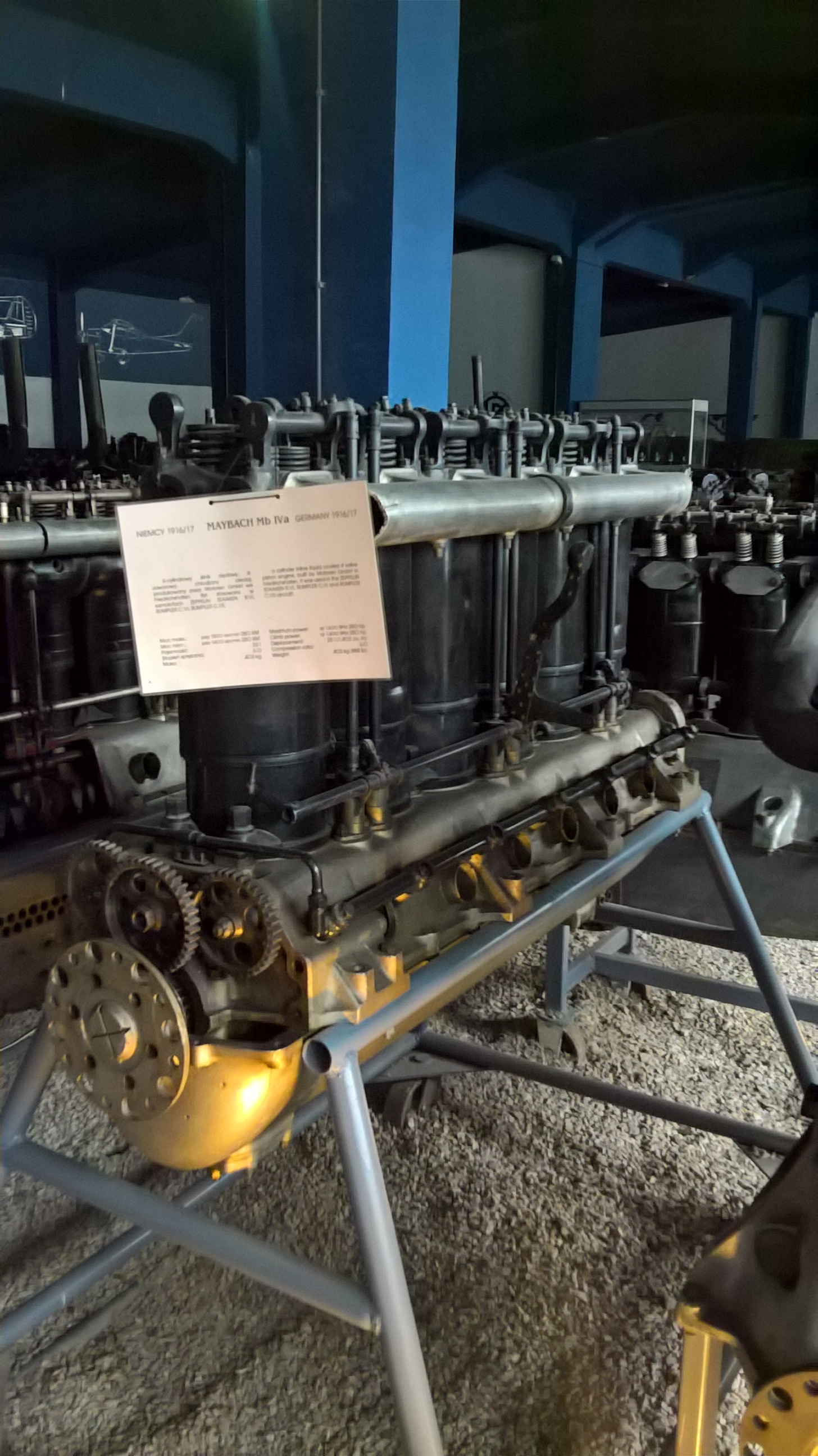 Niemiecki 6-cylindrowy silnik rzędowy Maybach Mb.IVa z 1917 r., eksponowany w Muzeum Lotnictwa Polskiego w Krakowie.